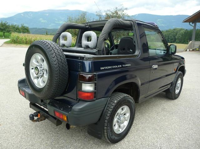 Pajero V20 Cabrio